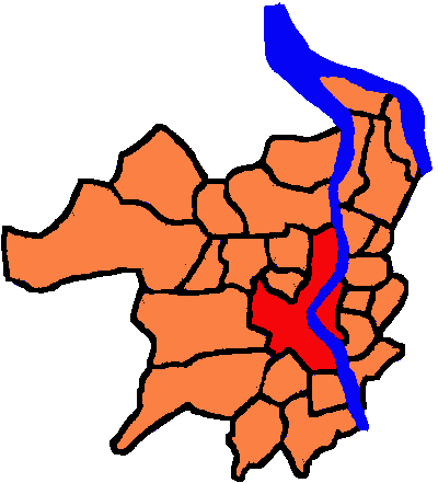 Agglomeration von Bordeaux: Communauté Urbaine de Bordeaux (CUB). Selbst erstellt von Benutzer:Bordeaux. Unterliegt der GNU-Lizenz Originalbild abgespeichert als jpg von Benutzer:Bordeaux. Nach png konvertiert von Benutzer:Phrood Orignalbild: Bild:Bordeaux-agglomeration.JPG